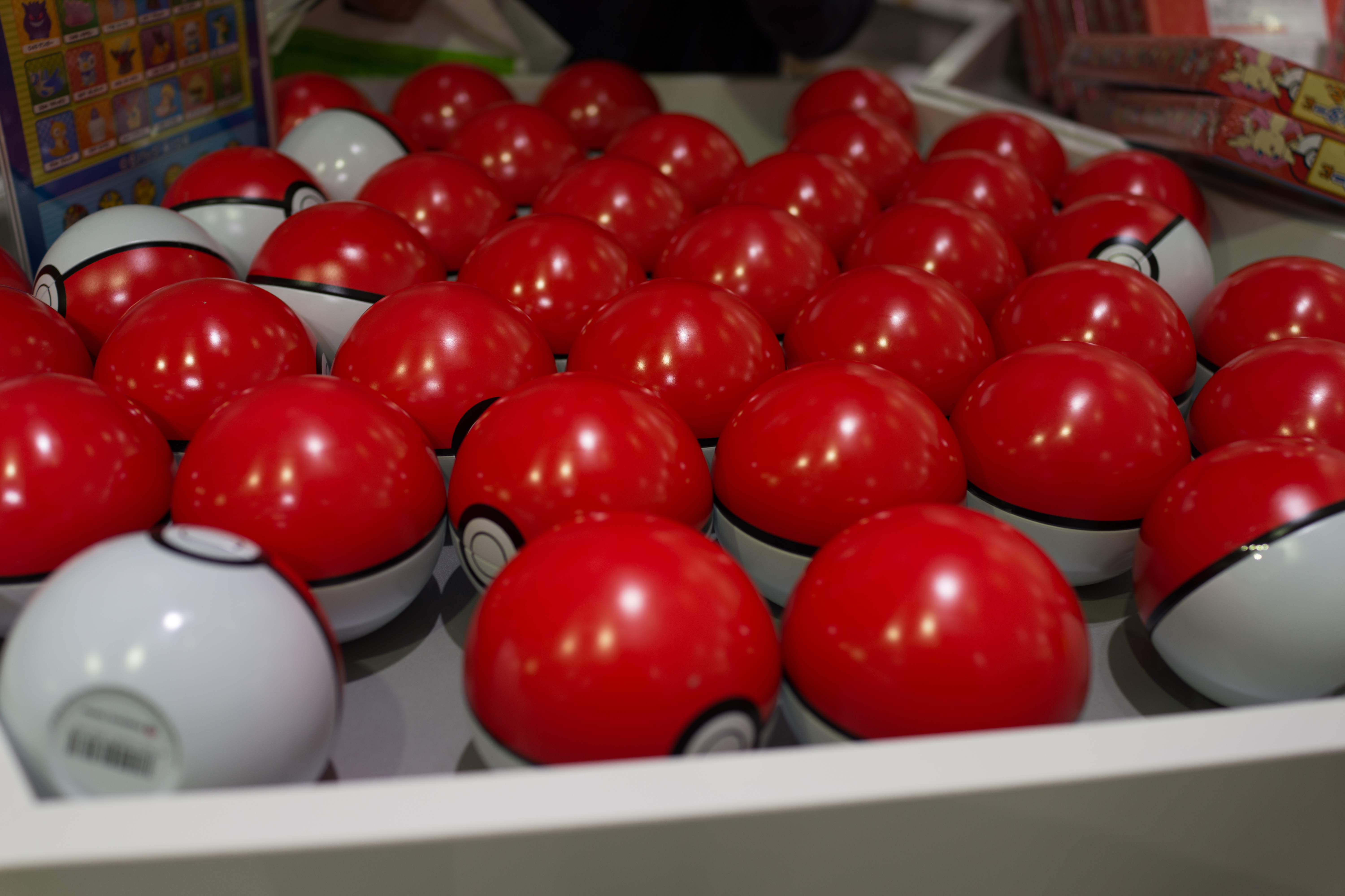 Pokemon getto da ze! De nombreuses Poké Ball.